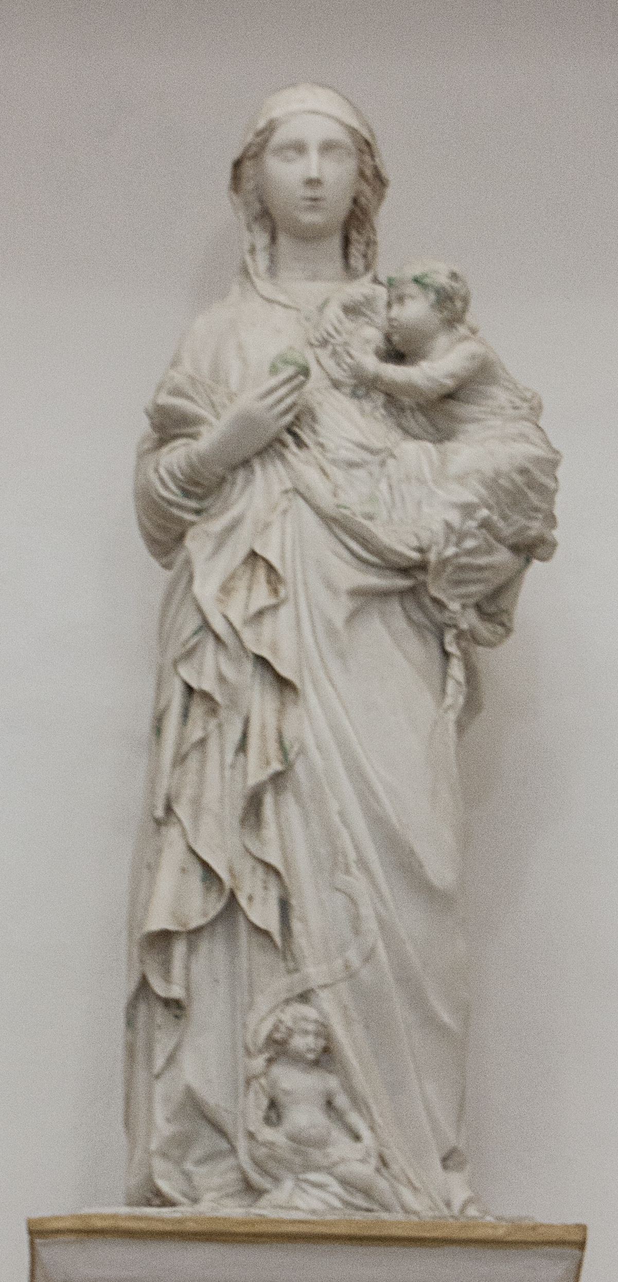 Madonna con bambino - Domenico Gagini